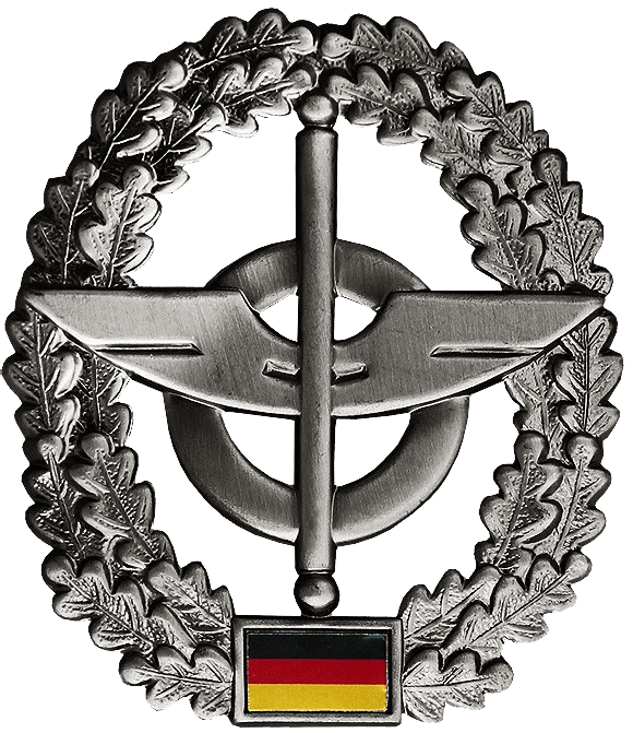 Barettabzeichen der Nachschubtruppe der Bundeswehr Barettfarbe: Korallenrot Maße: Hoch: 53mm Breit: 46mm Ausführung: altsilber, Metall